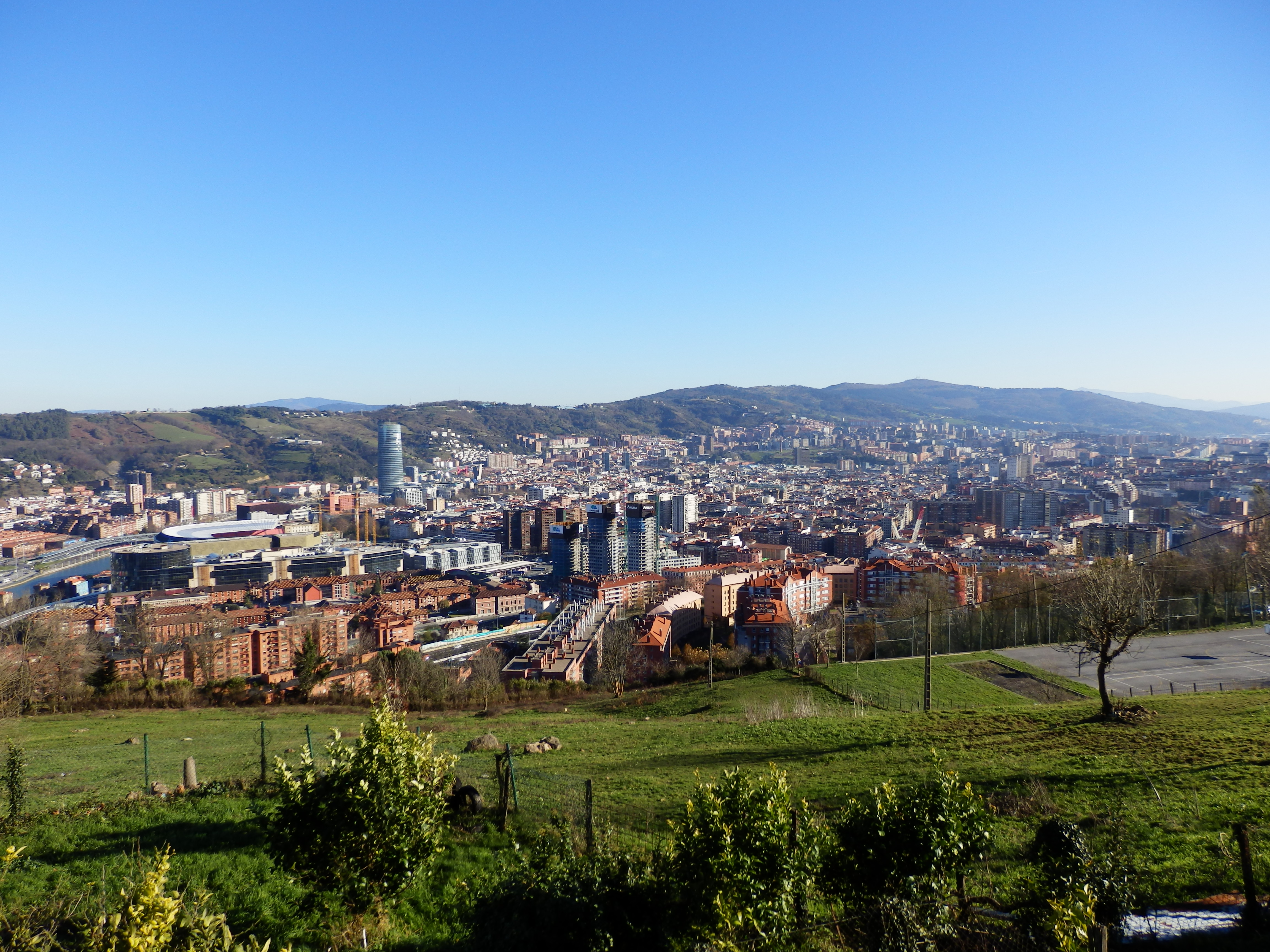 Vista de Bilbao desde el Monte Kobetas. Está tomada en dirección este.